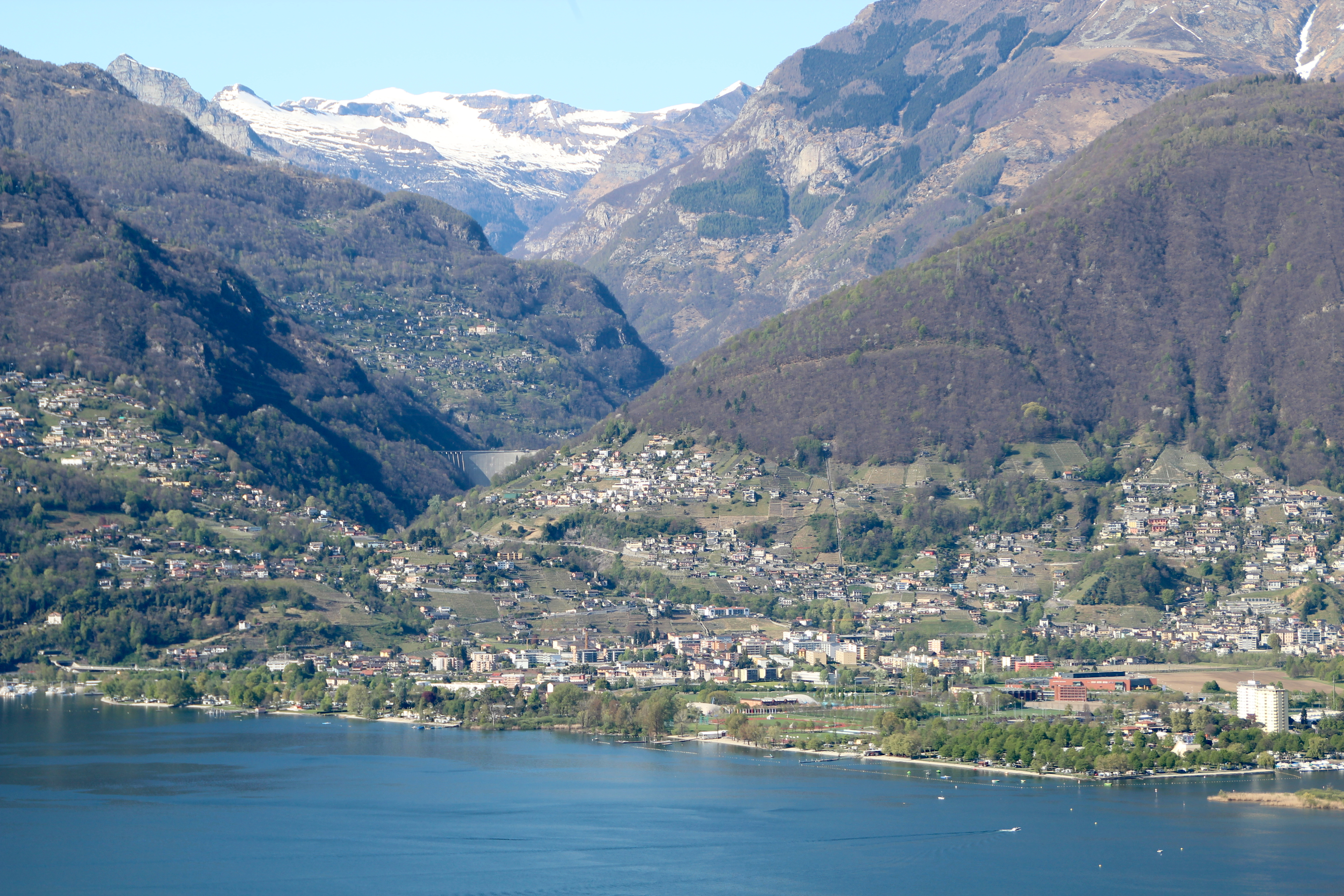 Blick ins Verzascatal (Valle Verzasca).